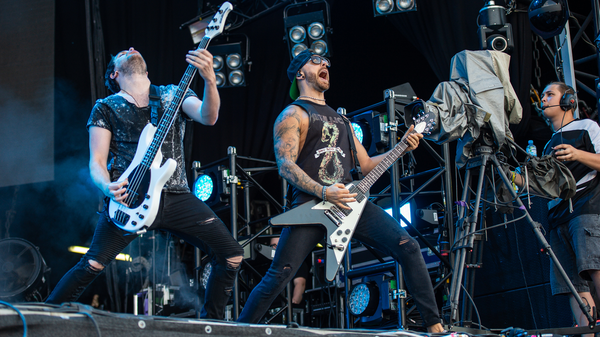 ARGO-Konzerte,Beck's Park Stage,Bullet for My Valentine,Festival,Jamie Mathias,Konzert,Livekonzert,Livemusik,Matthew Tuck,Musik,RiP,Rock im Park 2018